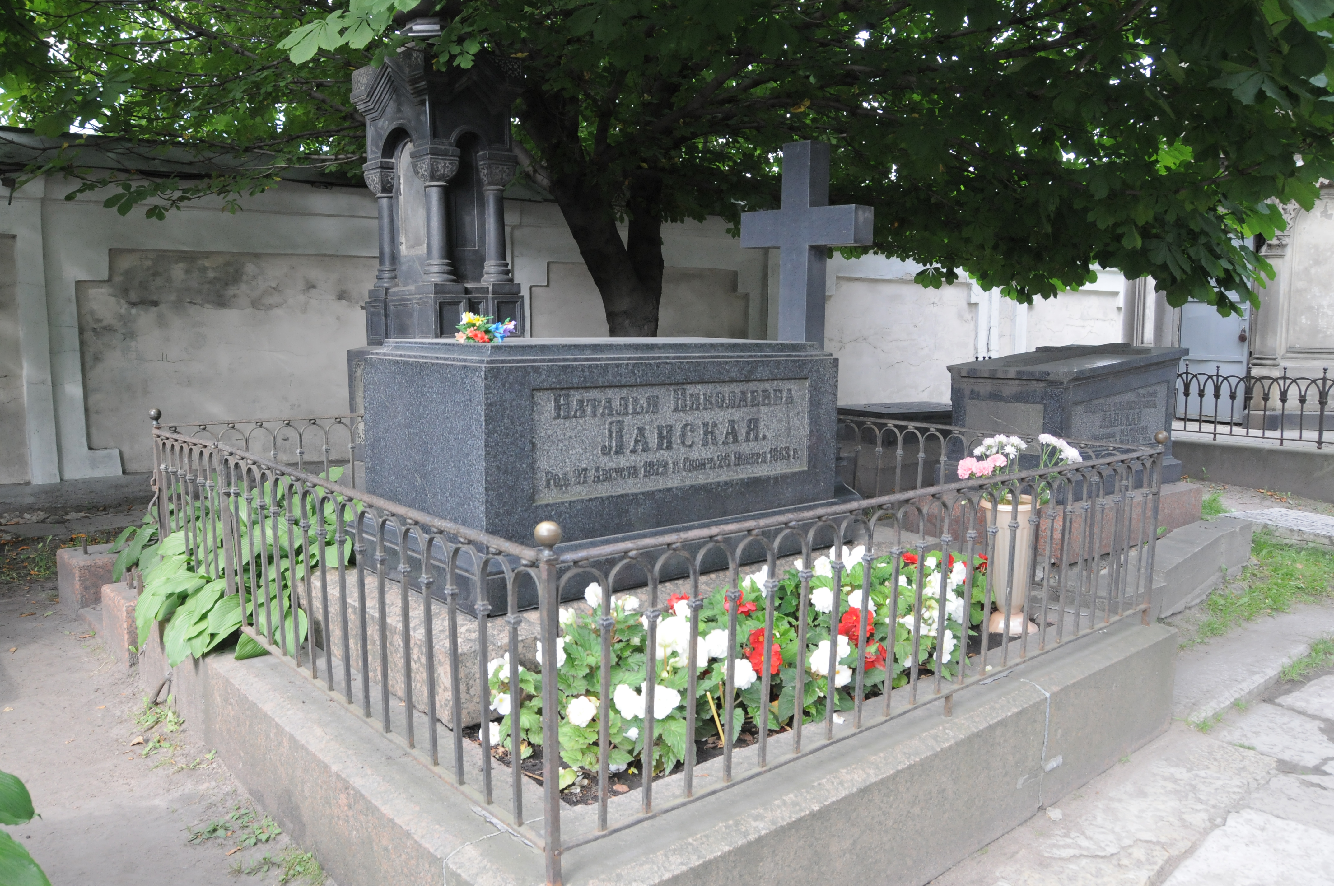 Могила Натальи Николаевны Ланской на Лазаревском кладбище Александро-Невской лавры